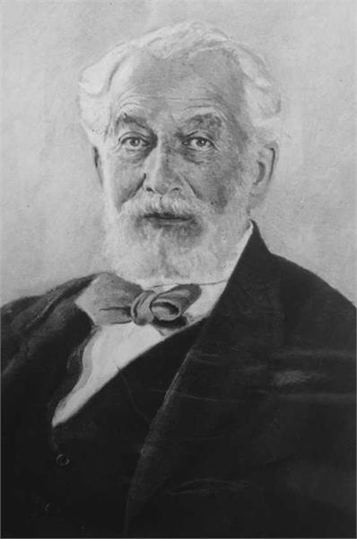 הברון ( אדמונד דה רוטשילד ּ1934 - 1845ׂ